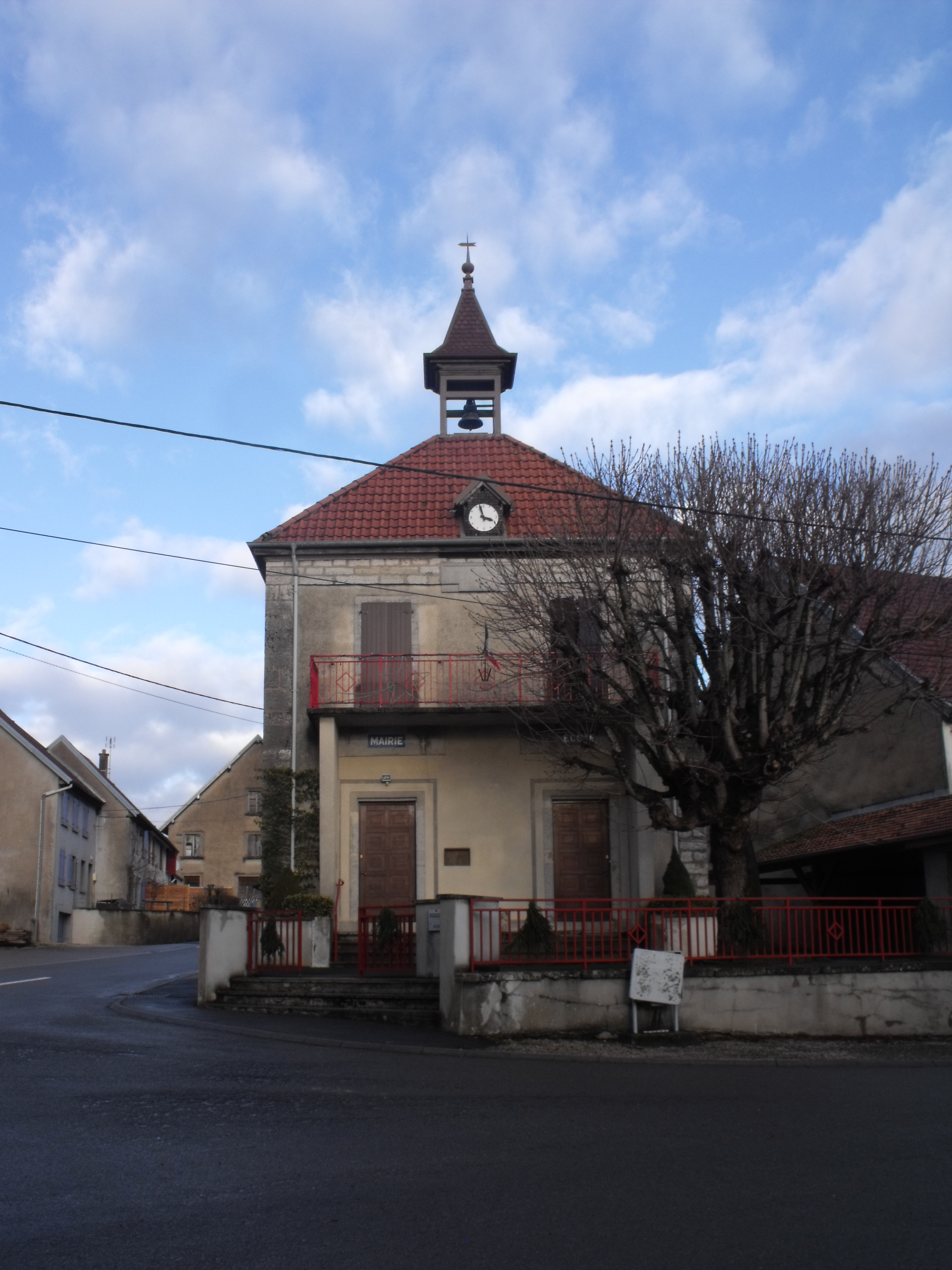 Mairie d'Ecurcey, Doubs, France